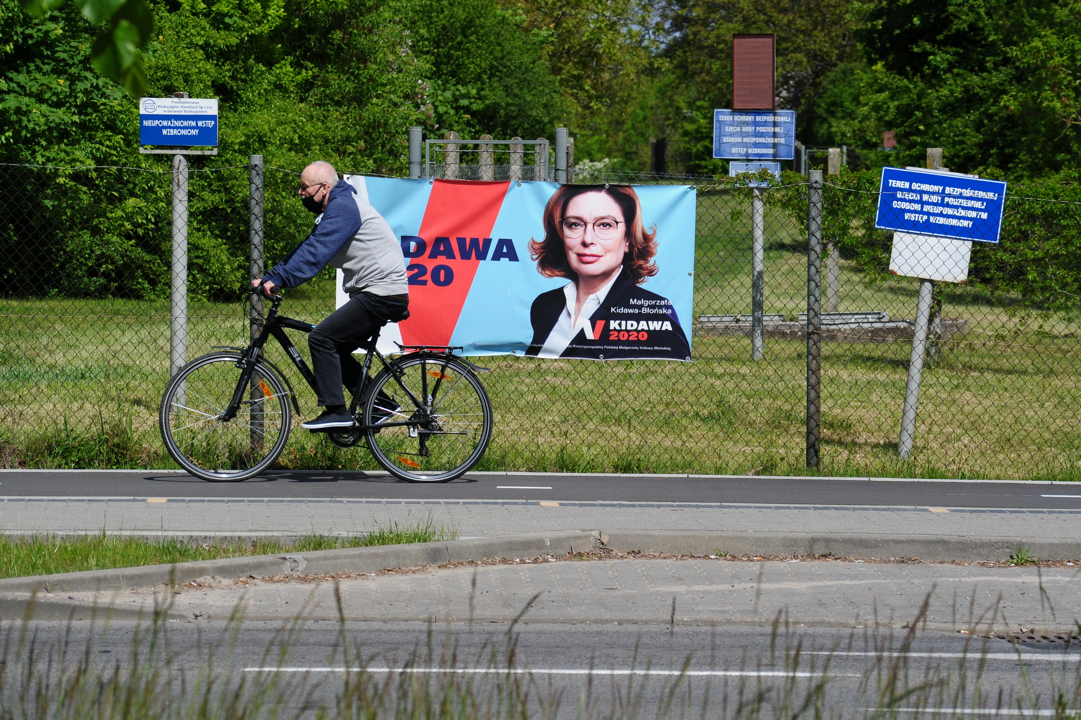 Gorzów Wlkp., ul. Roosevelta. Wybory prezydenckie w Polsce w 2020 roku.